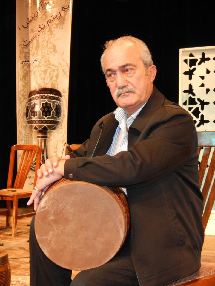 بهمن رجبی در کنسرت الیگودرز به همراه گروه تنبوک